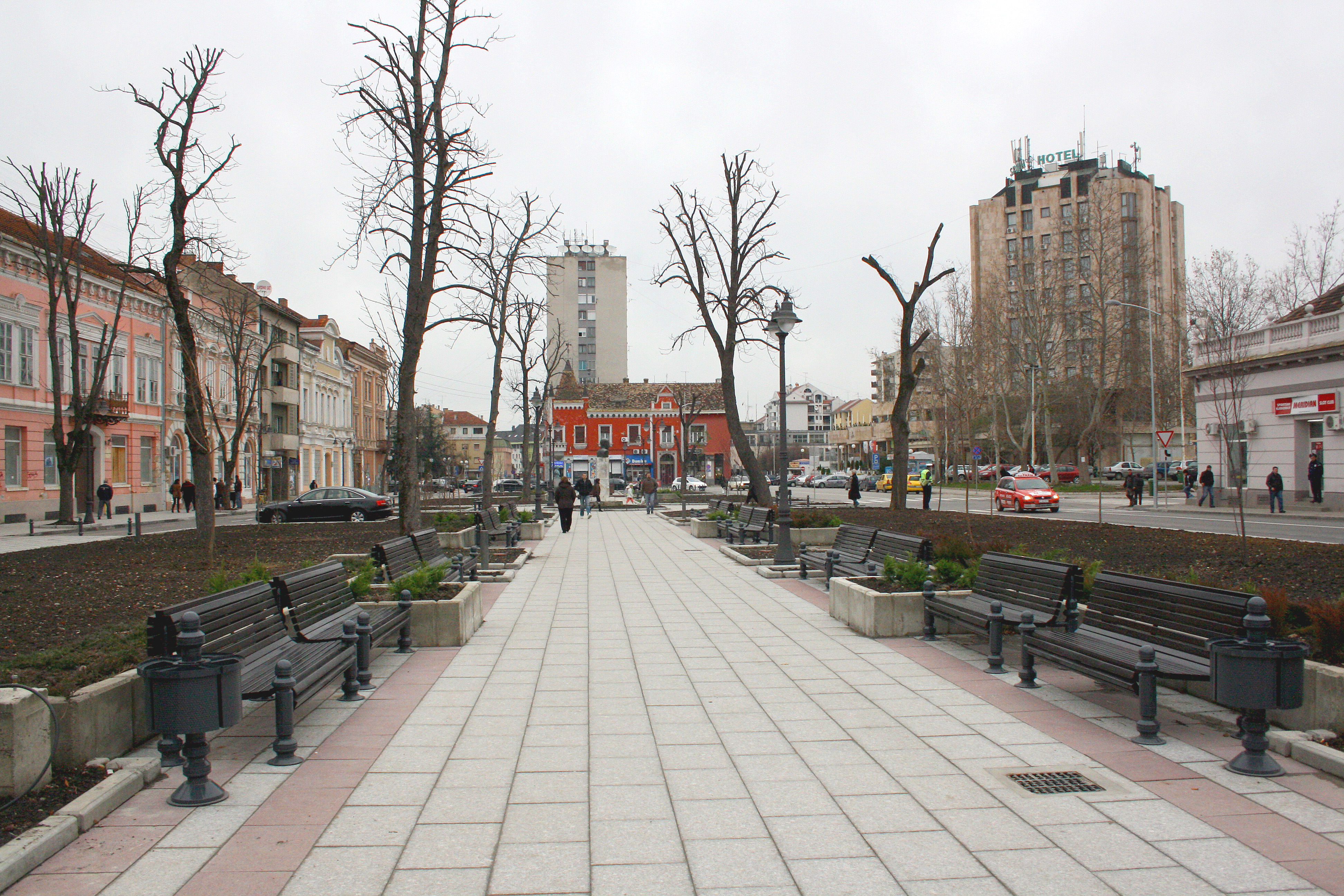 Руски паркић, Вршац, Србија.